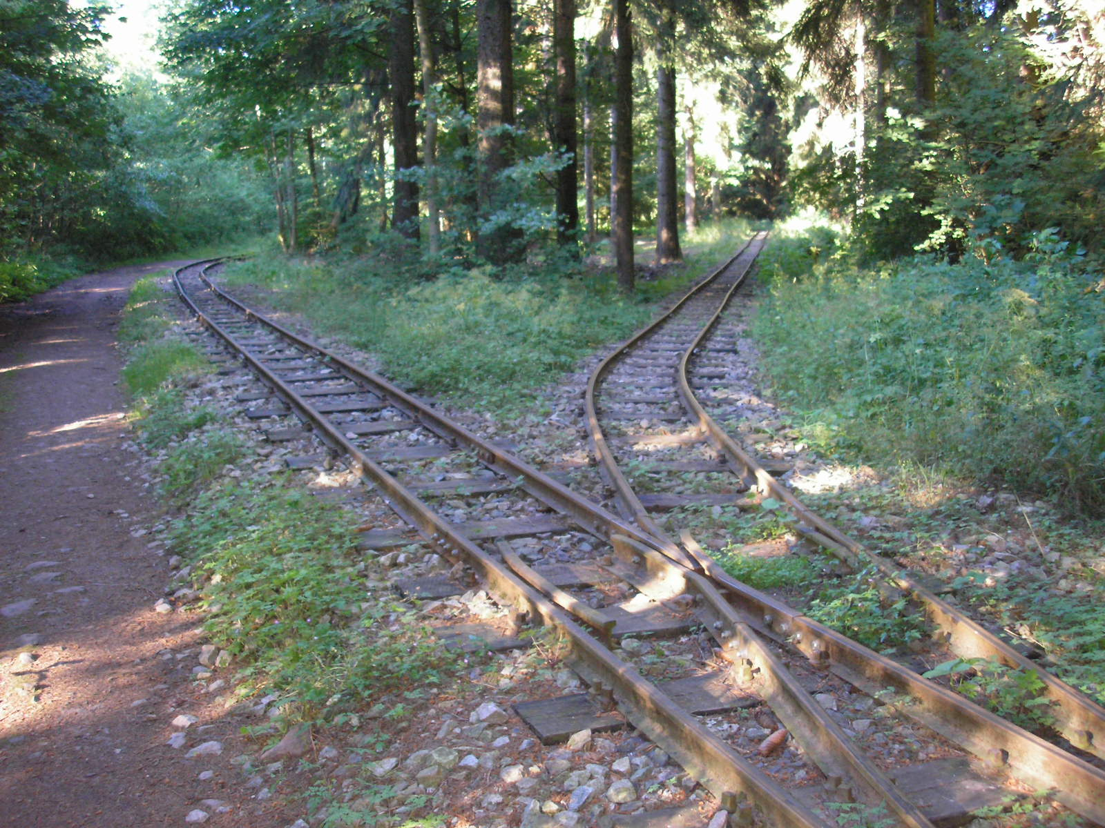 Gleise der Lorenbahn des Schaubergwerkes "Volle Rose" bei Ilmenau (Thüringen).